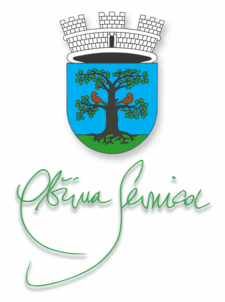 Grb Občina Sevnica